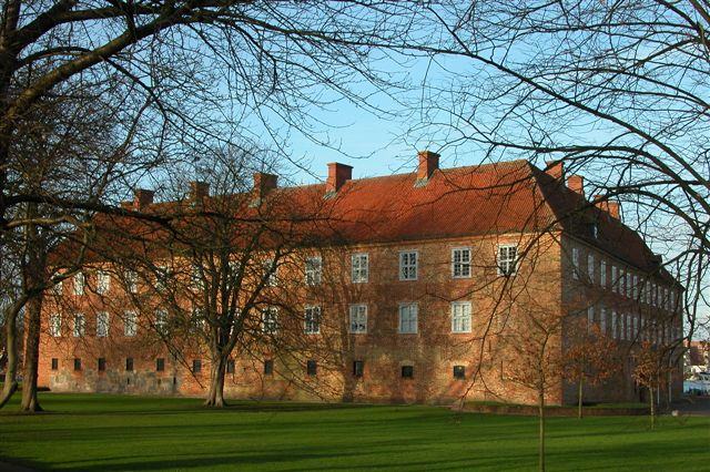 Sønderborg Slot, south-site